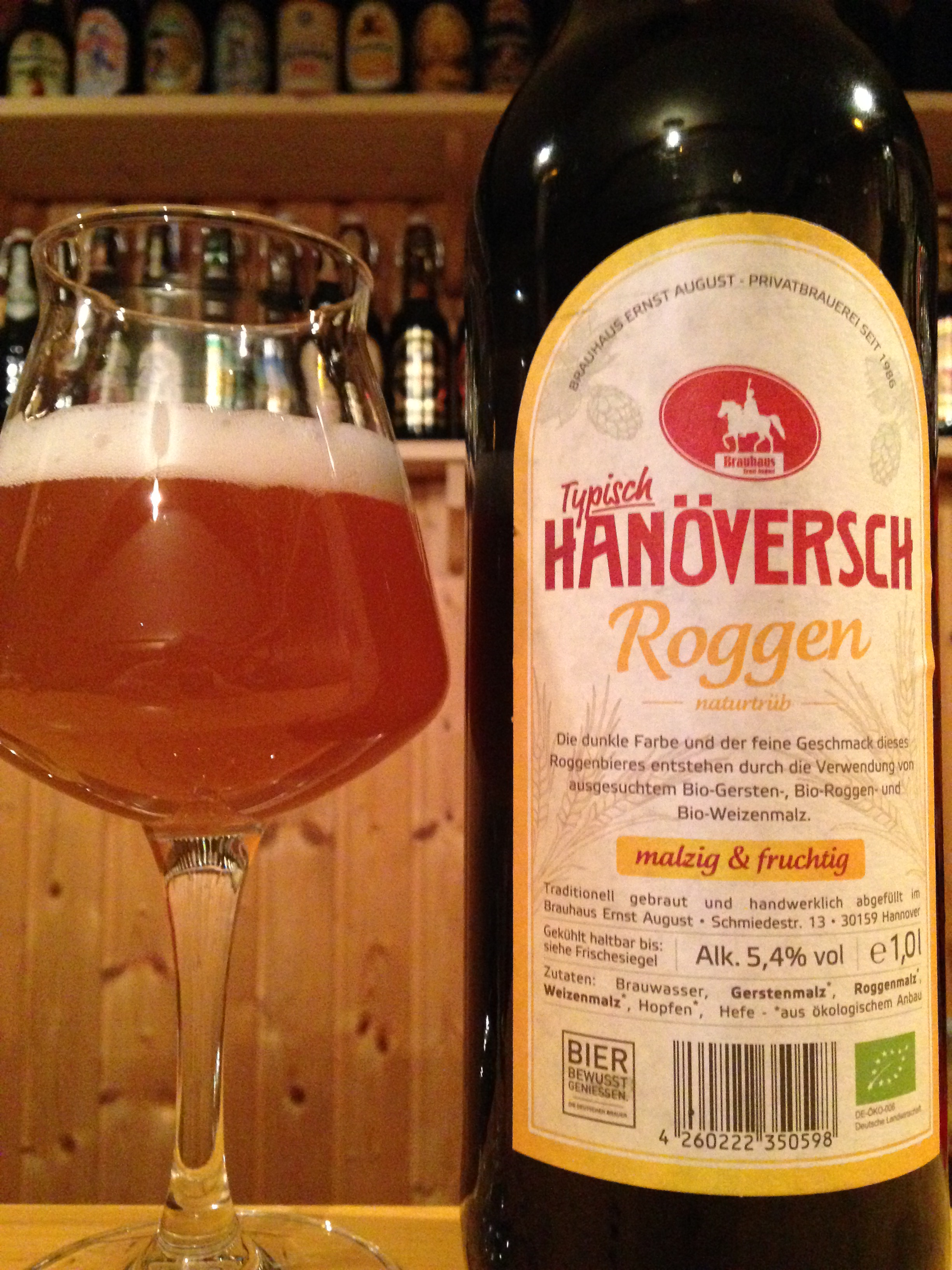 Typisch Hannöversch Roggen aus dem Brauhaus Ernst August, Hannover mit Gersten-, Roggen- und Weizenmalz. Malze und Hopfen aus biologischem Anbau.